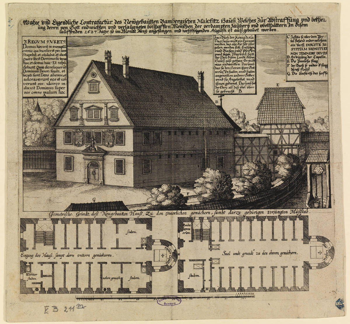 Außenansicht mit Grundrissen des Bamberger Malefizhauses/Drudenhaus, in dem die der Hexerei Angeklagten gefangengehalten und peinlich verhört wurden. Kupferstich, 1627 (Staatsbibliothek Bamberg, V B 211-m)